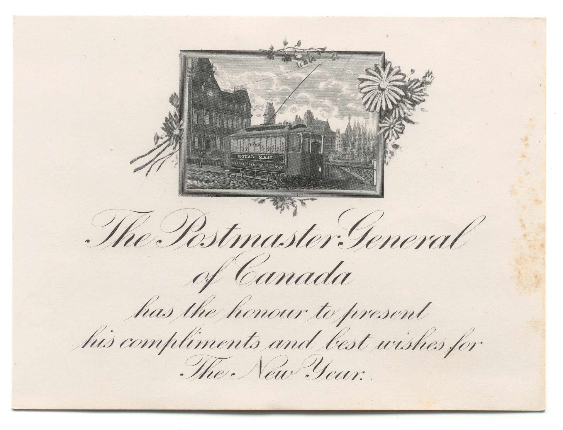 New Year card/Nyttårspostkort fra Canada 1899. I arkivet etter Samferdselsdepartementet, Poststyret, 1. postadministrasjonskontor.